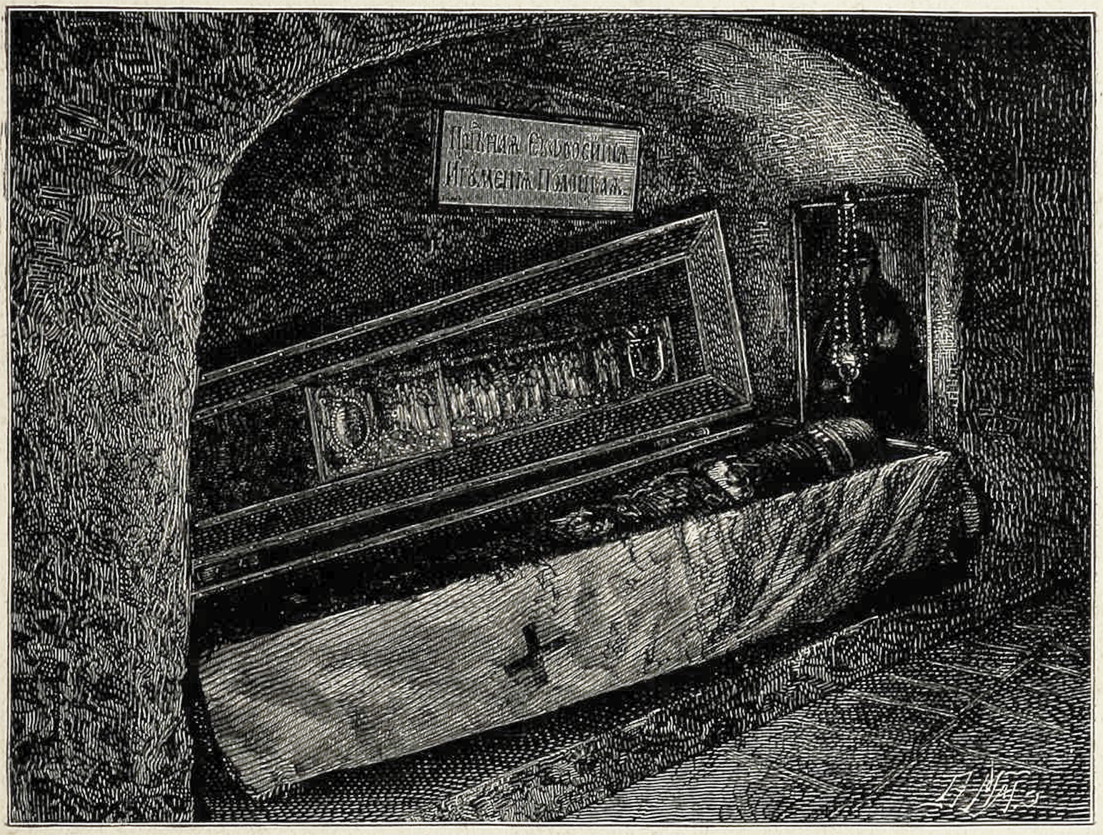 Беларуская (тарашкевіца): Труна Эўфрасіньні Полацкай (Eŭfrasińnia Połackaja) у Кіева-Пячорскай лаўры.